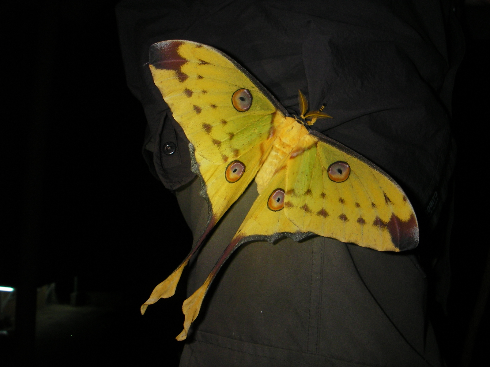 Argema mittrei, Ranomafana, Madagascar